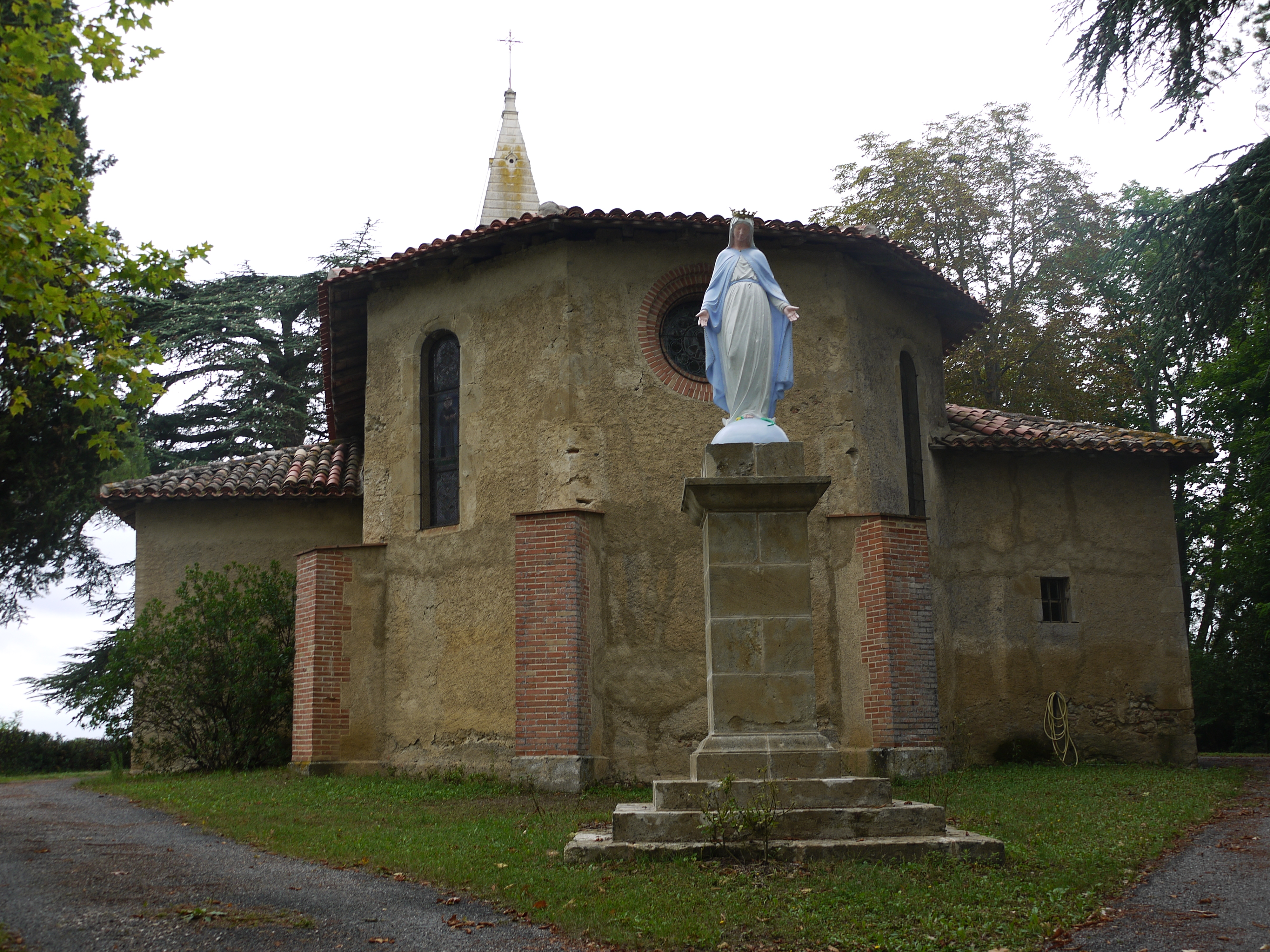 L'église Saint-Pierre-ès-Liens vue depuis l'est et une statue de la Vierge à Saint-Élix-d'Astarac.